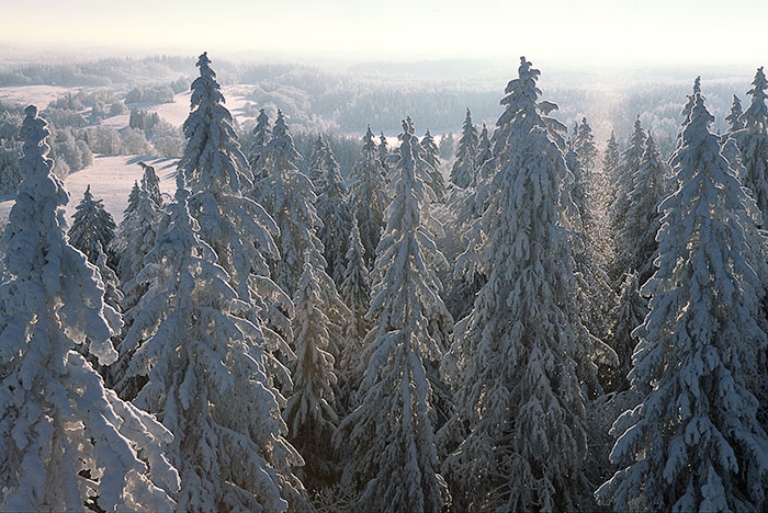 Vaade Suure Munamäe vaatetornist